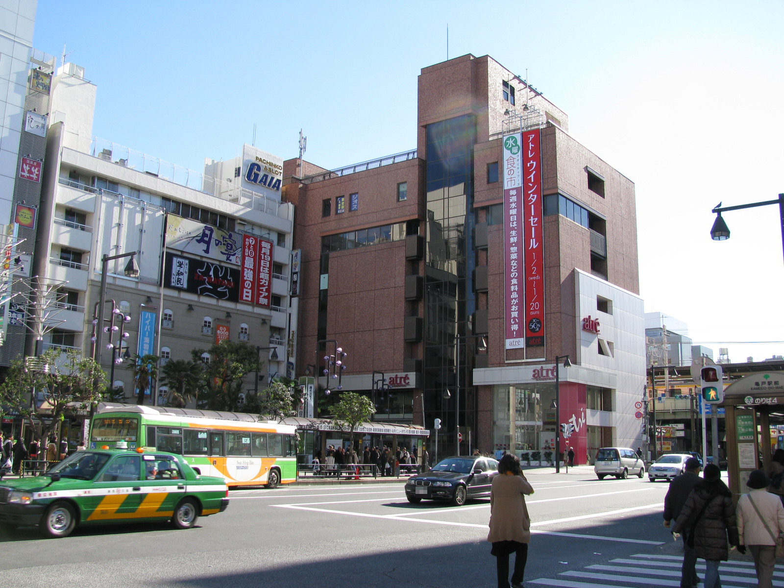 JR亀戸駅、東武鉄道亀戸駅（西口）